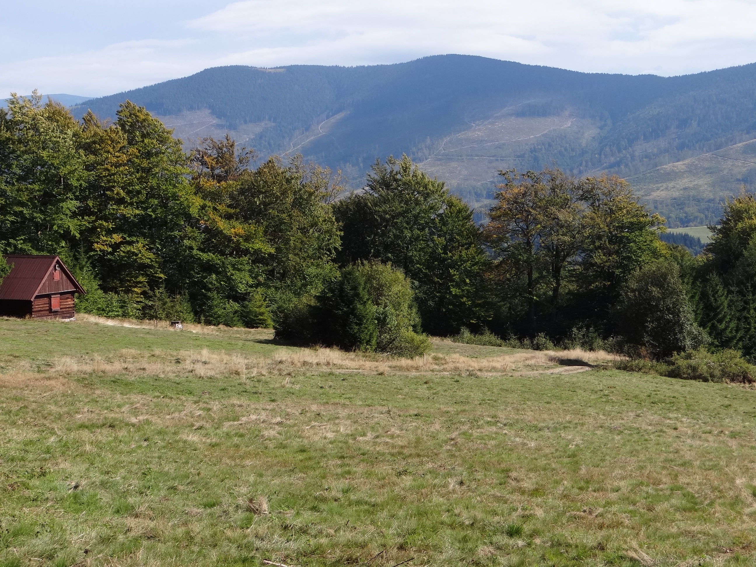 Polana na Prusowie i widok na grupę Lipowskiego Wierchu